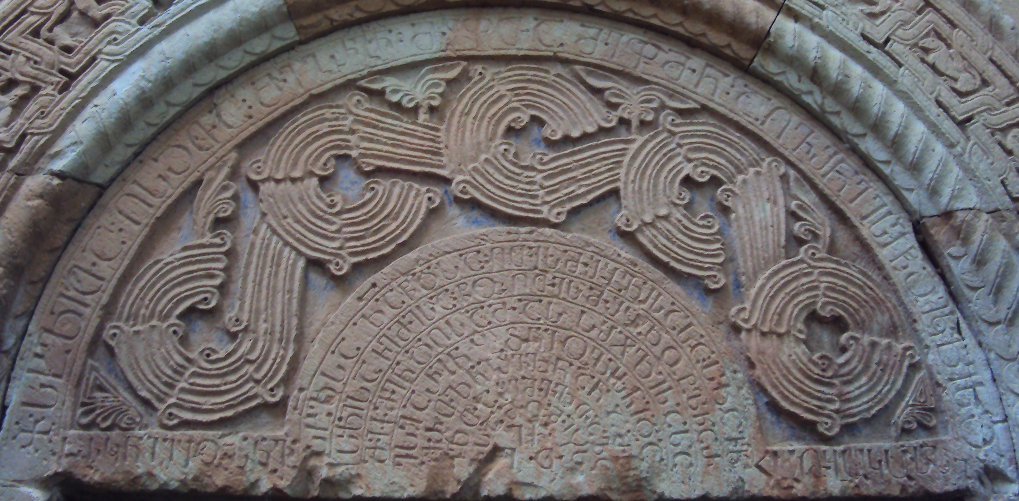 იშხნის მცირე ტაძრის შესასვლელის ტიმპანის წარწერა.